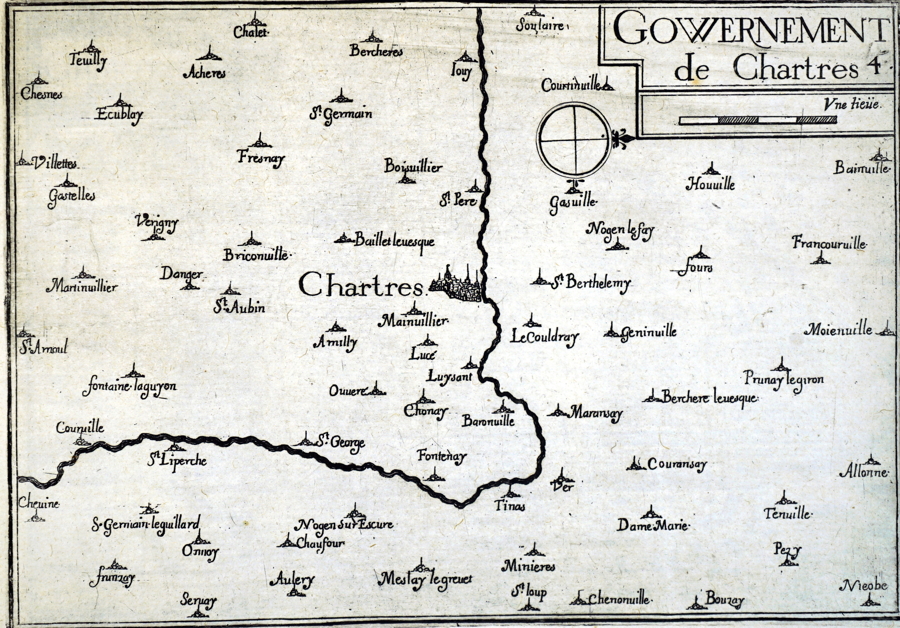 plan de Tassin.